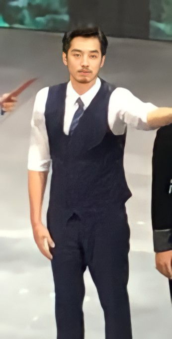 中文（中国大陆）: 2019年10月5日 午场的《威尼斯商人》